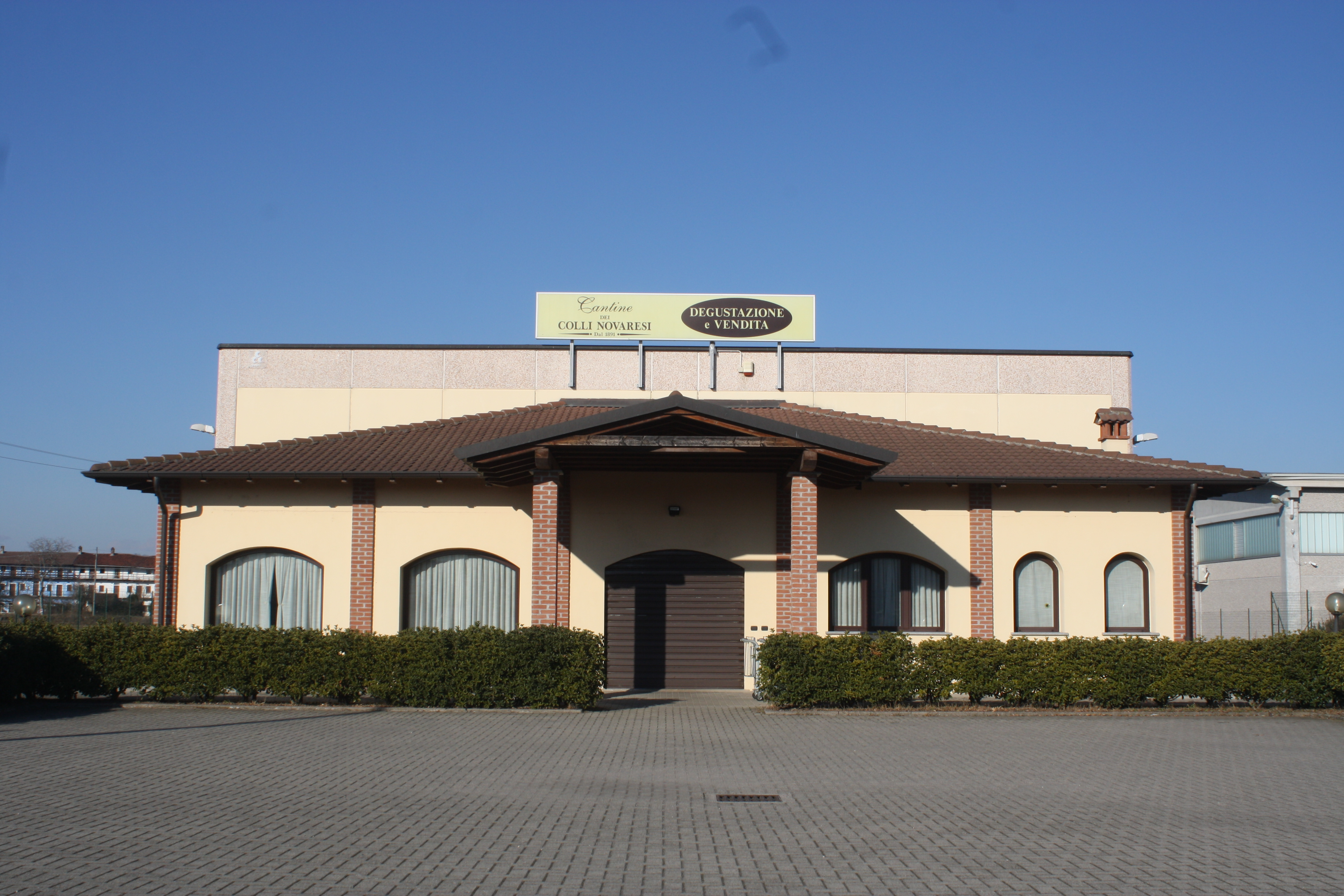 Punto vendita di Oleggio del Consorzio Cantine Novaresi.